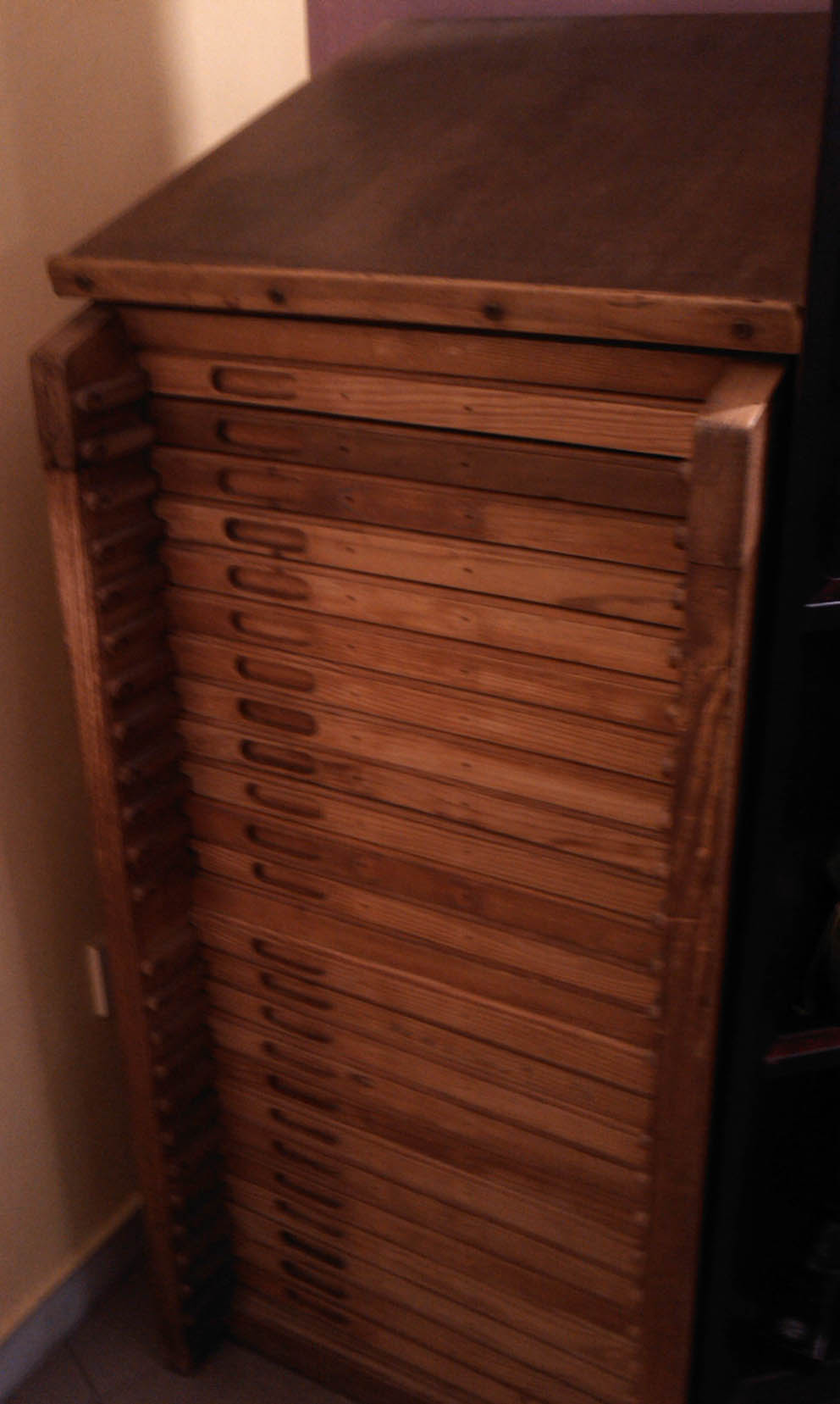 Chibalete